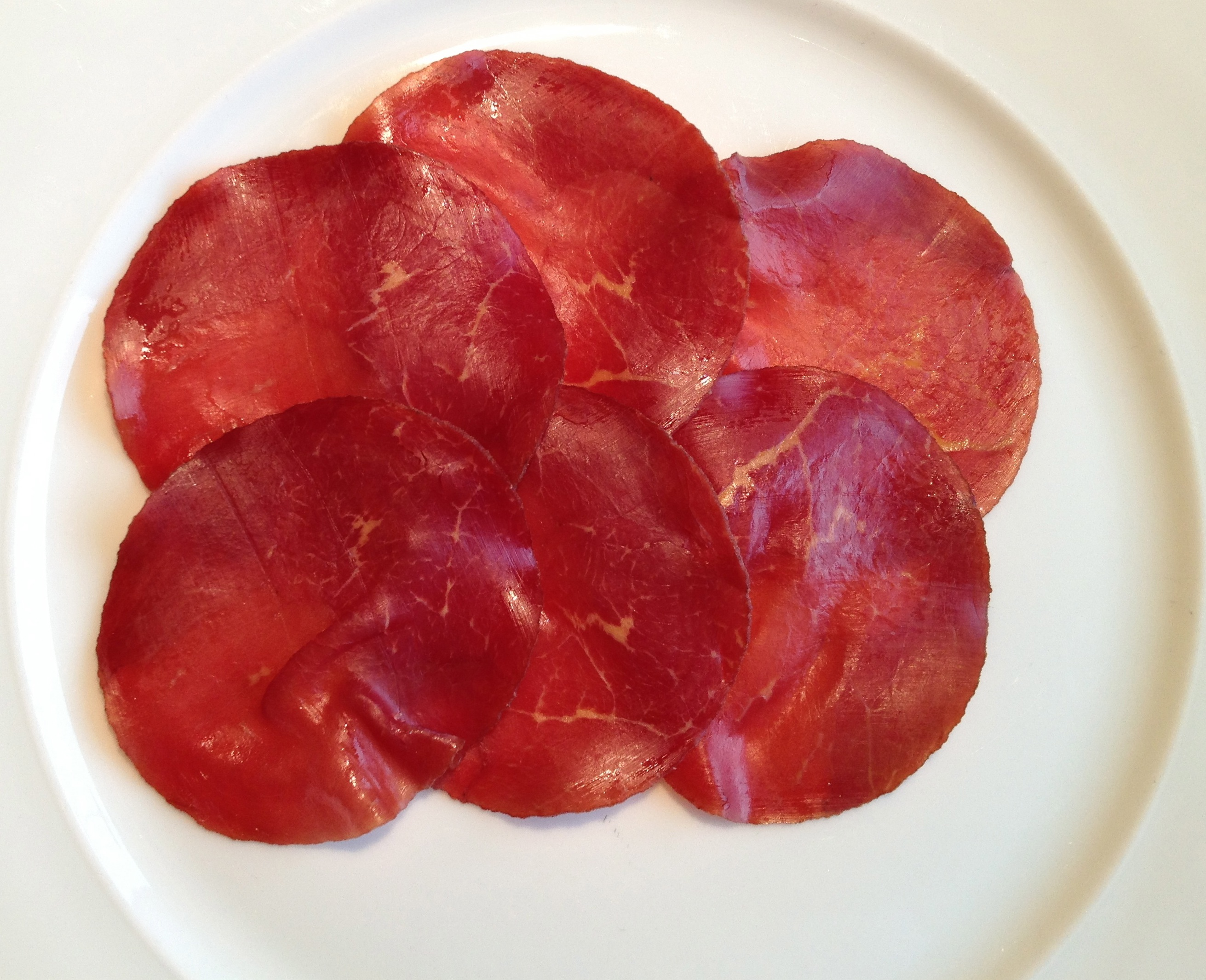 Mostbröckli